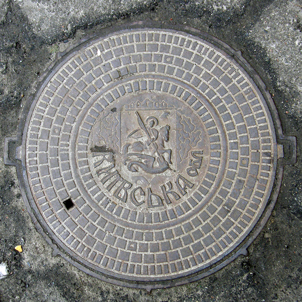 канализационный люк с гербом Киевской области. Киев, левый берег